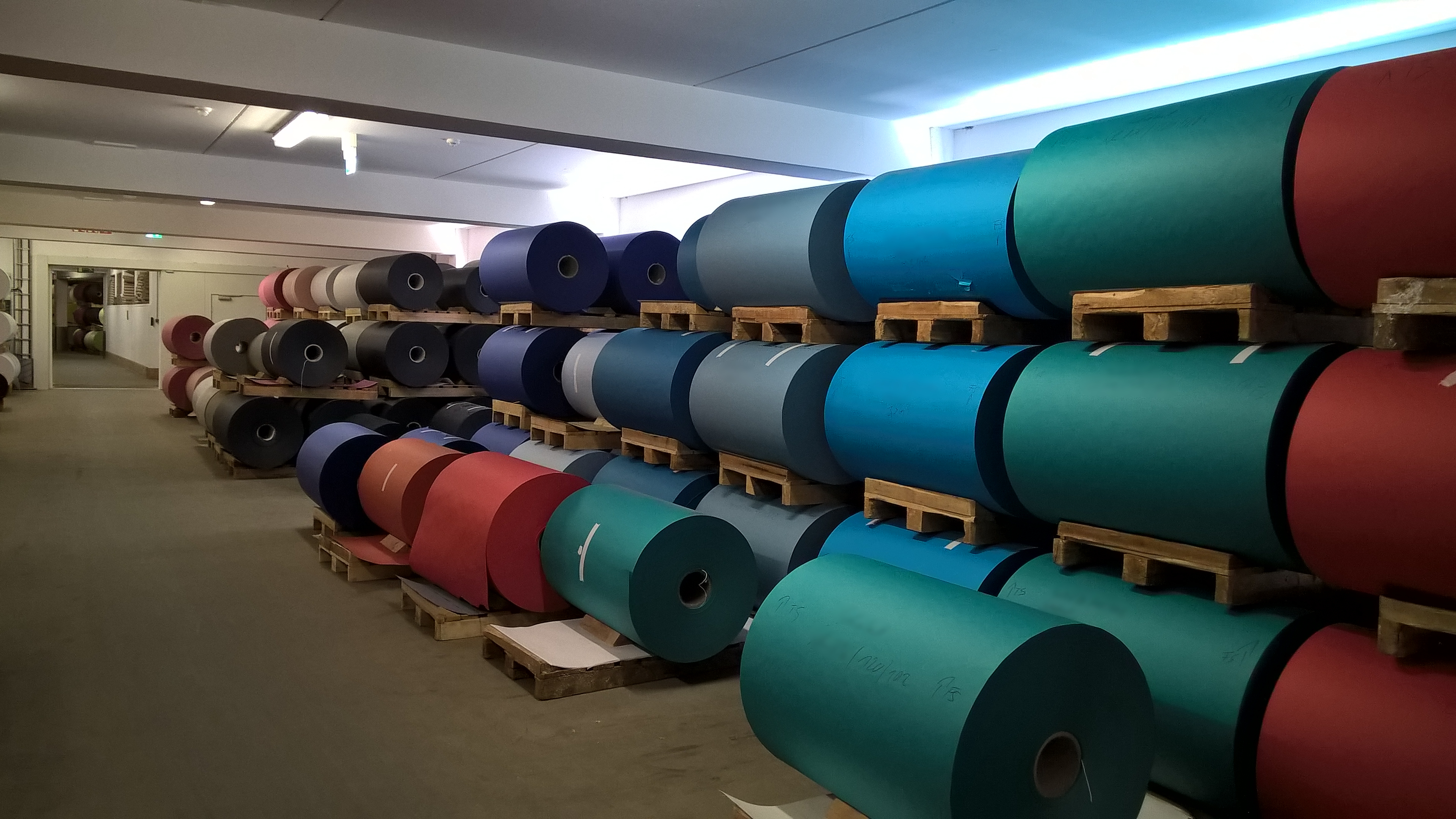 Farbige Büttenpapierrollen im Lager der Büttenpapierfabrik Gmund